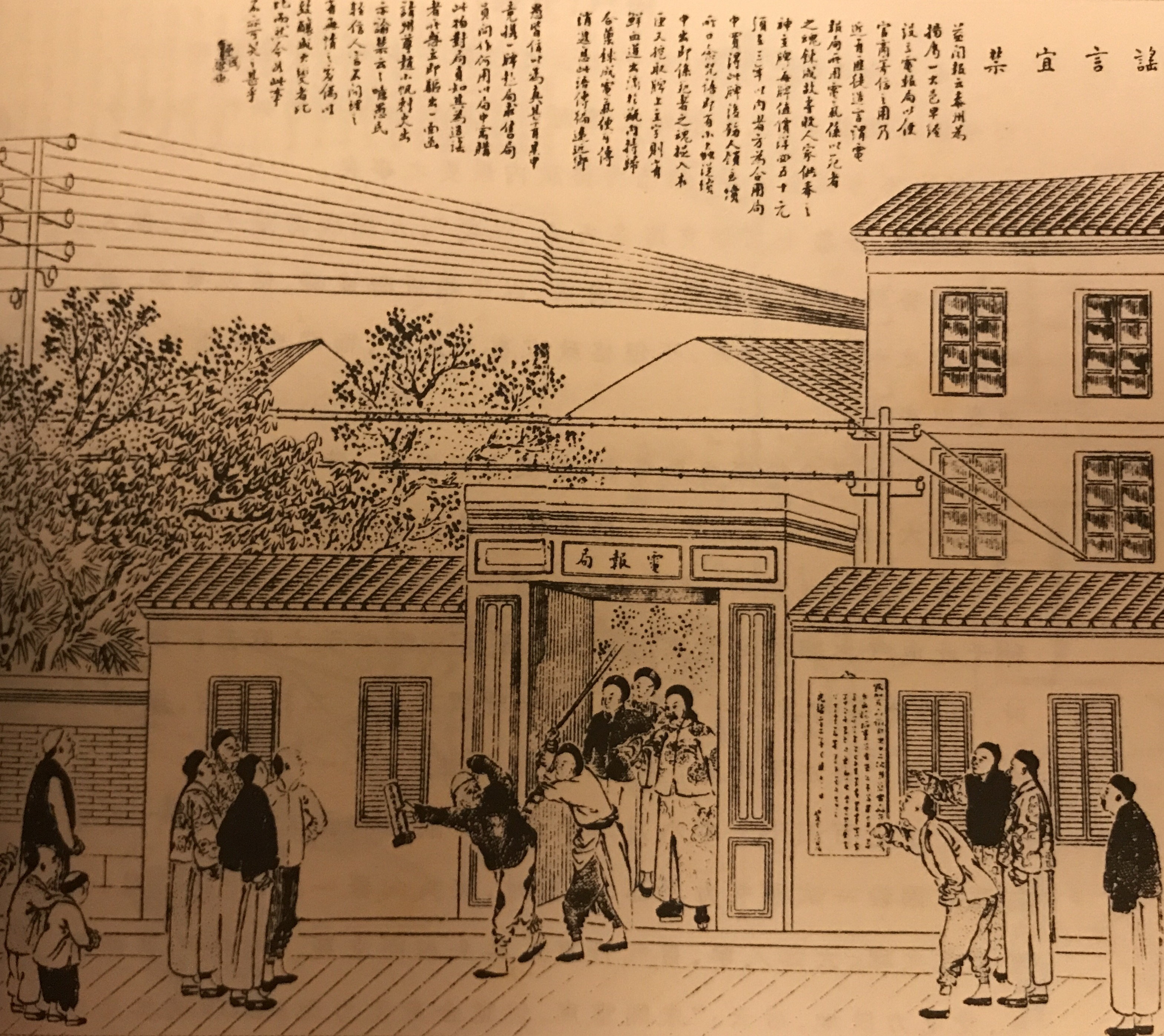 點石齋畫報的其中一篇畫作。